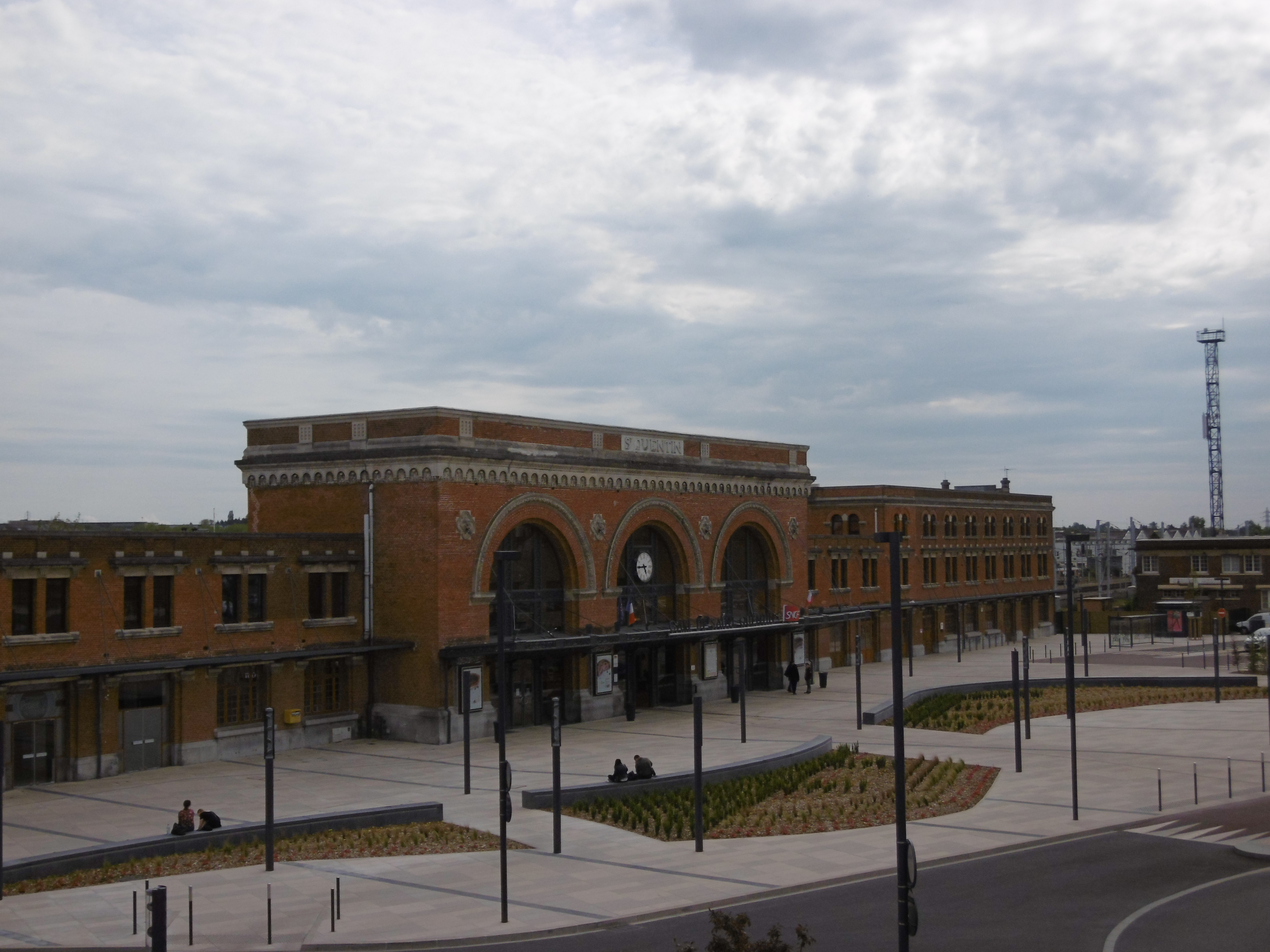 La gare de Saint-Quentin et son parvis vus depuis le pont d'Isle